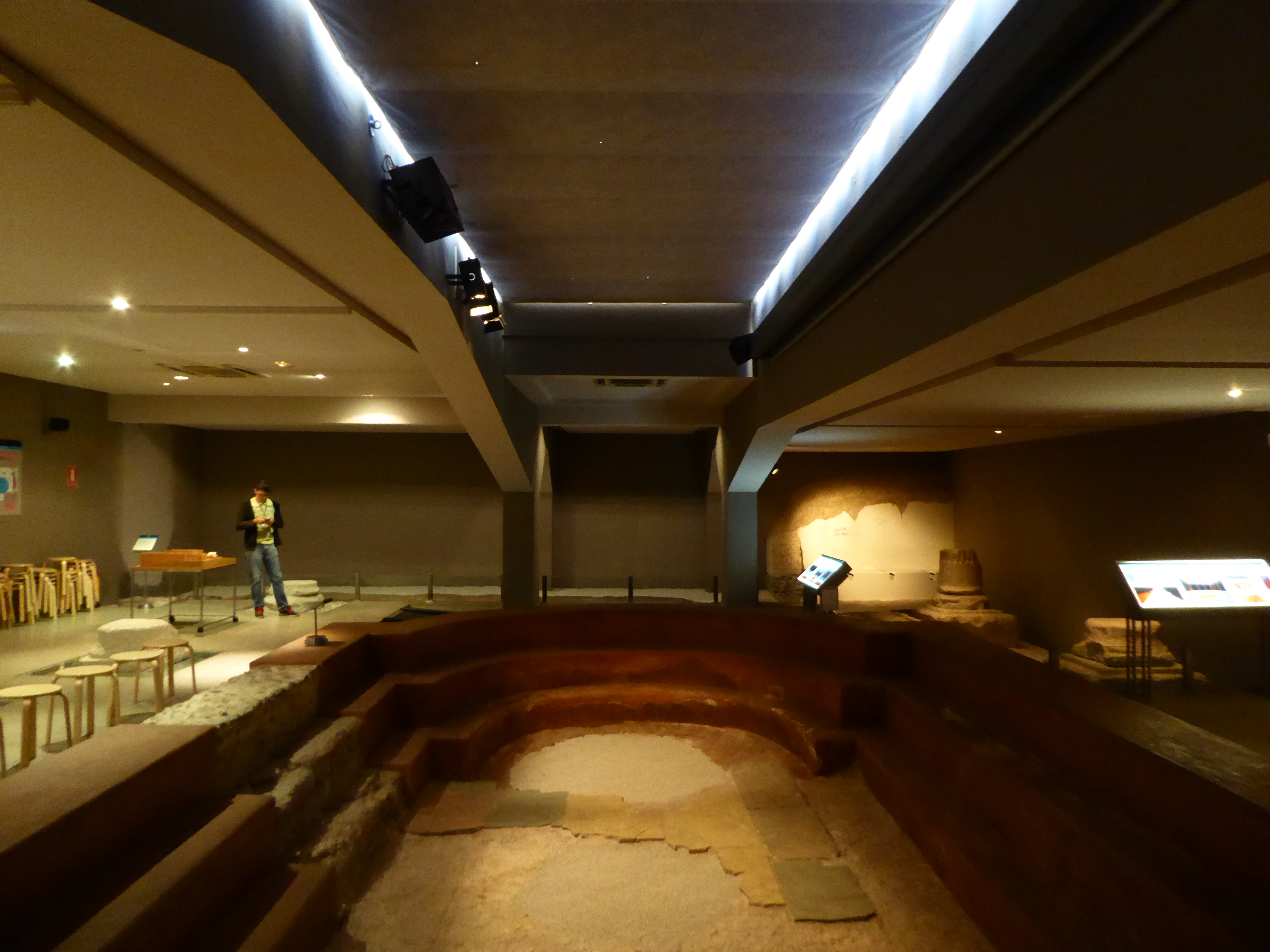 Piscina